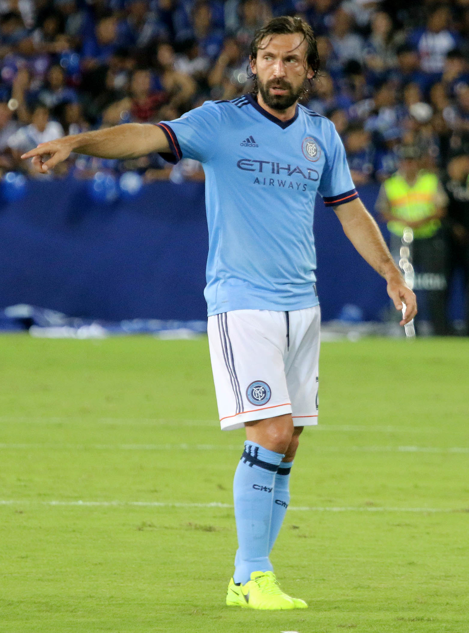 Guayaquil, miércoles 08 de febrero del 2017 (Andes).-Emelec enfrenta al New York City en la reinaguración del estadio Capwell Foto:Andes/César Muñoz